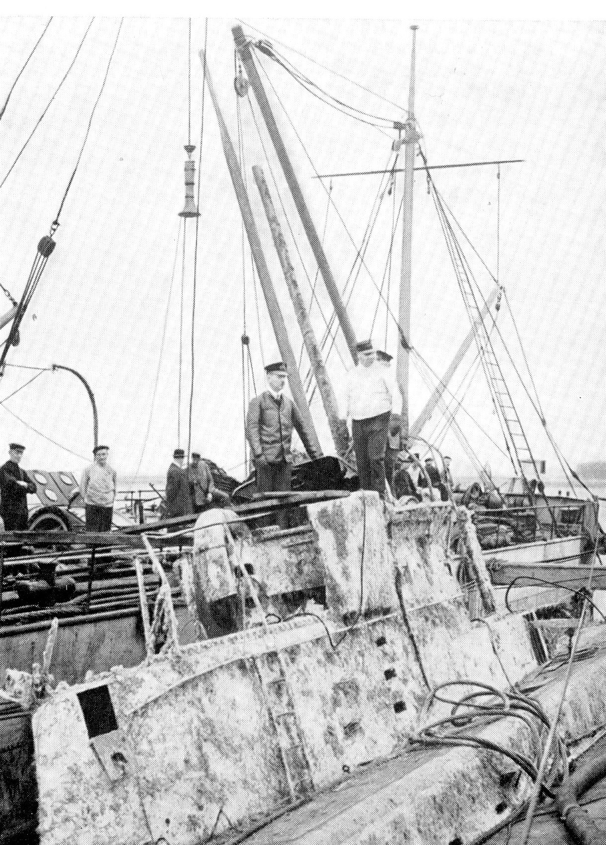 Wrack von U 30 in der Ems nach der Bergung. Aufnahmedatum unbekannt